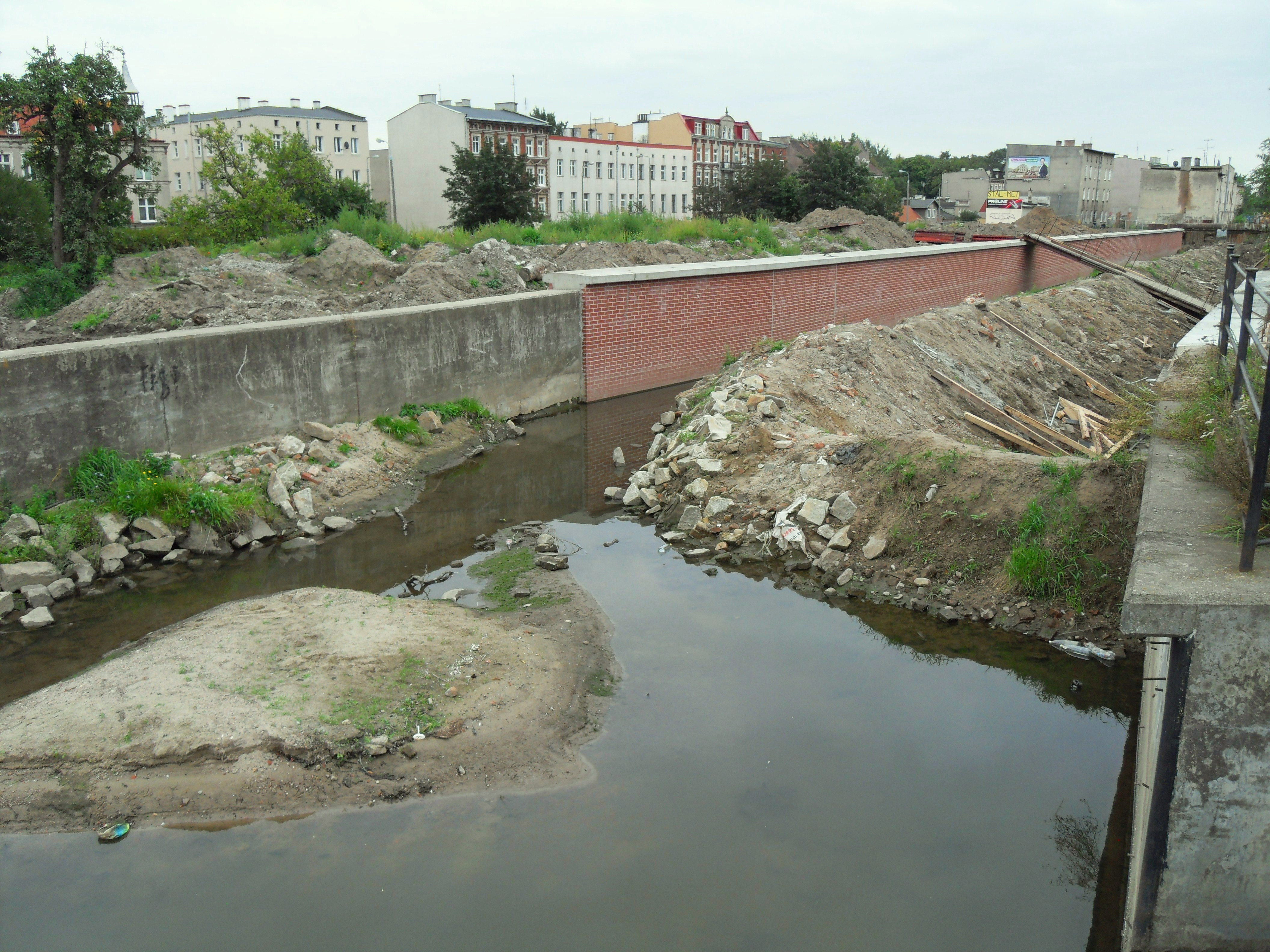 Gdańsk Orunia. Kanał Raduni, przebudowa.